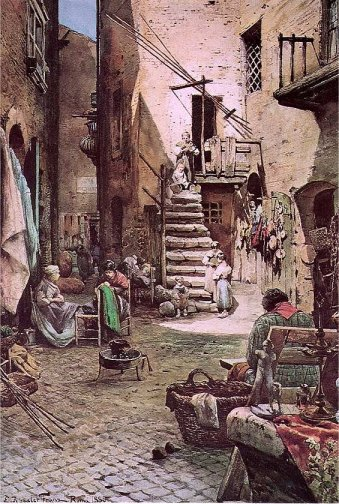 Vicolo Capocciuto in Ghetto (rione Sant'Angelo)